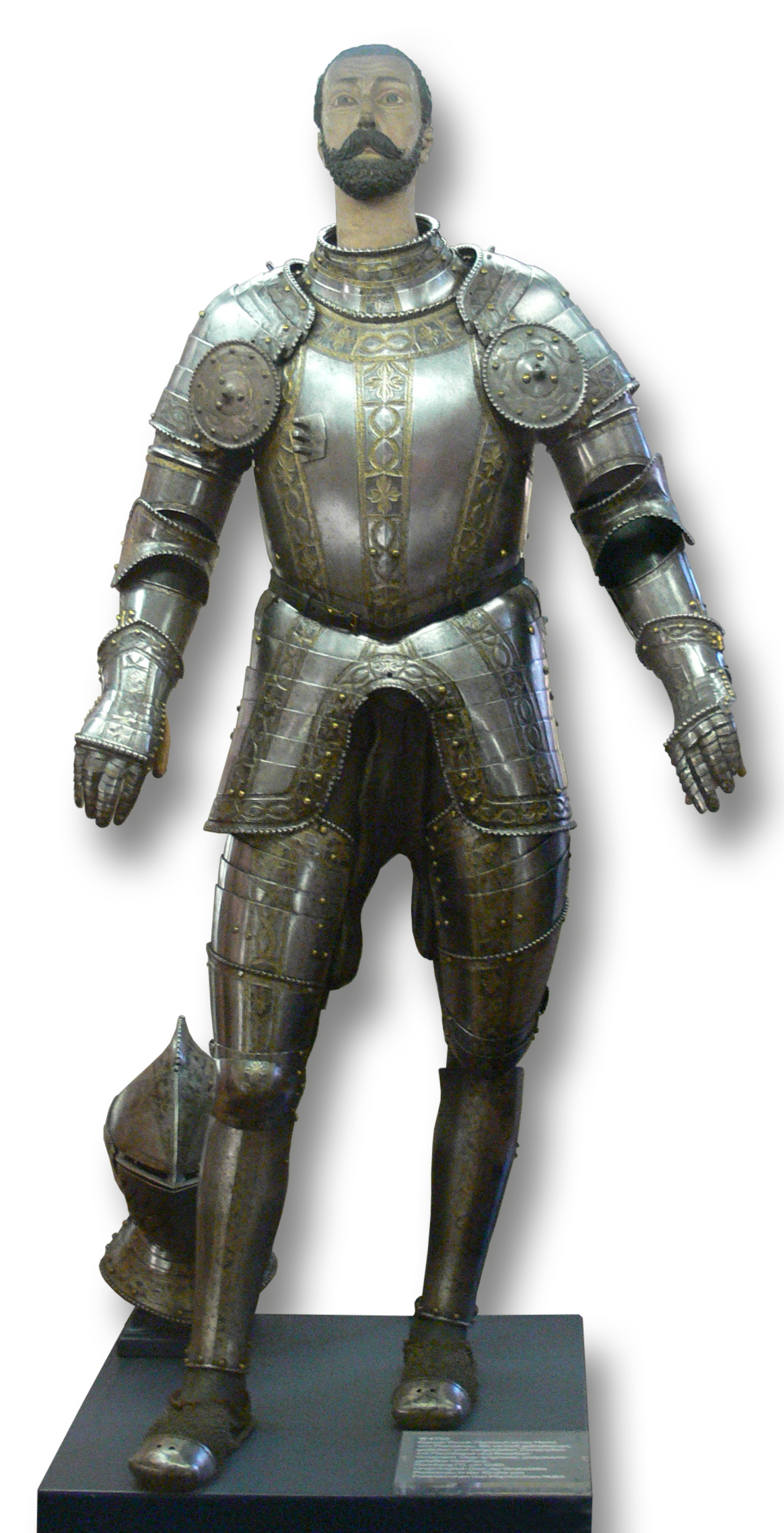 Prunkharnisch eines Herrn von Pienzenau, über originaler polychromer Holzfigur, Nürnberg (?) um 1550; aus der Grabstätte Pienzenau in der Kirche von Peterskirchen (bei Pfarrkirchen/Niederbayern); Bayerisches Nationalmuseum, München, W 4572